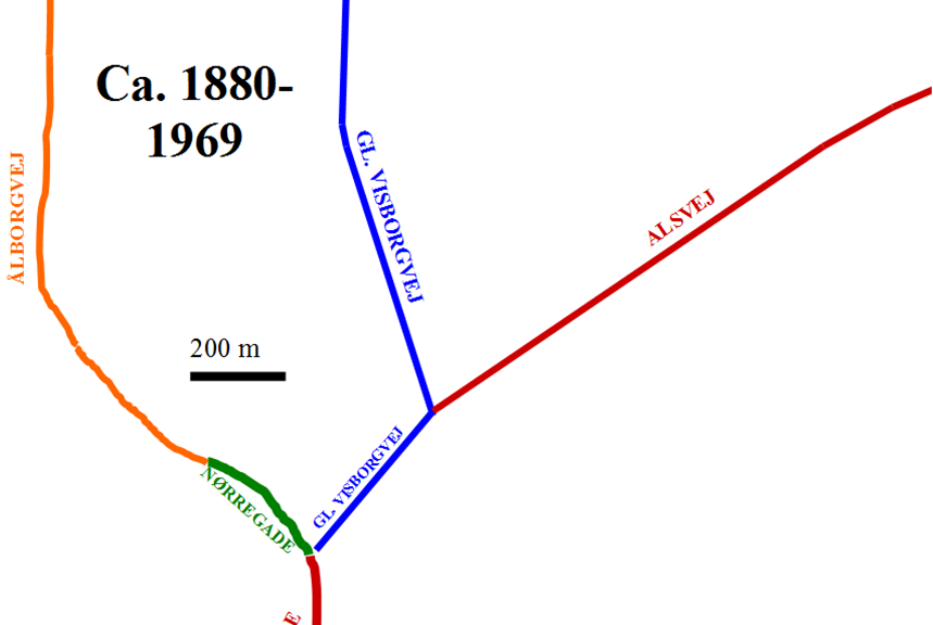 Dette er et billede af Østergades historie i Hadsund